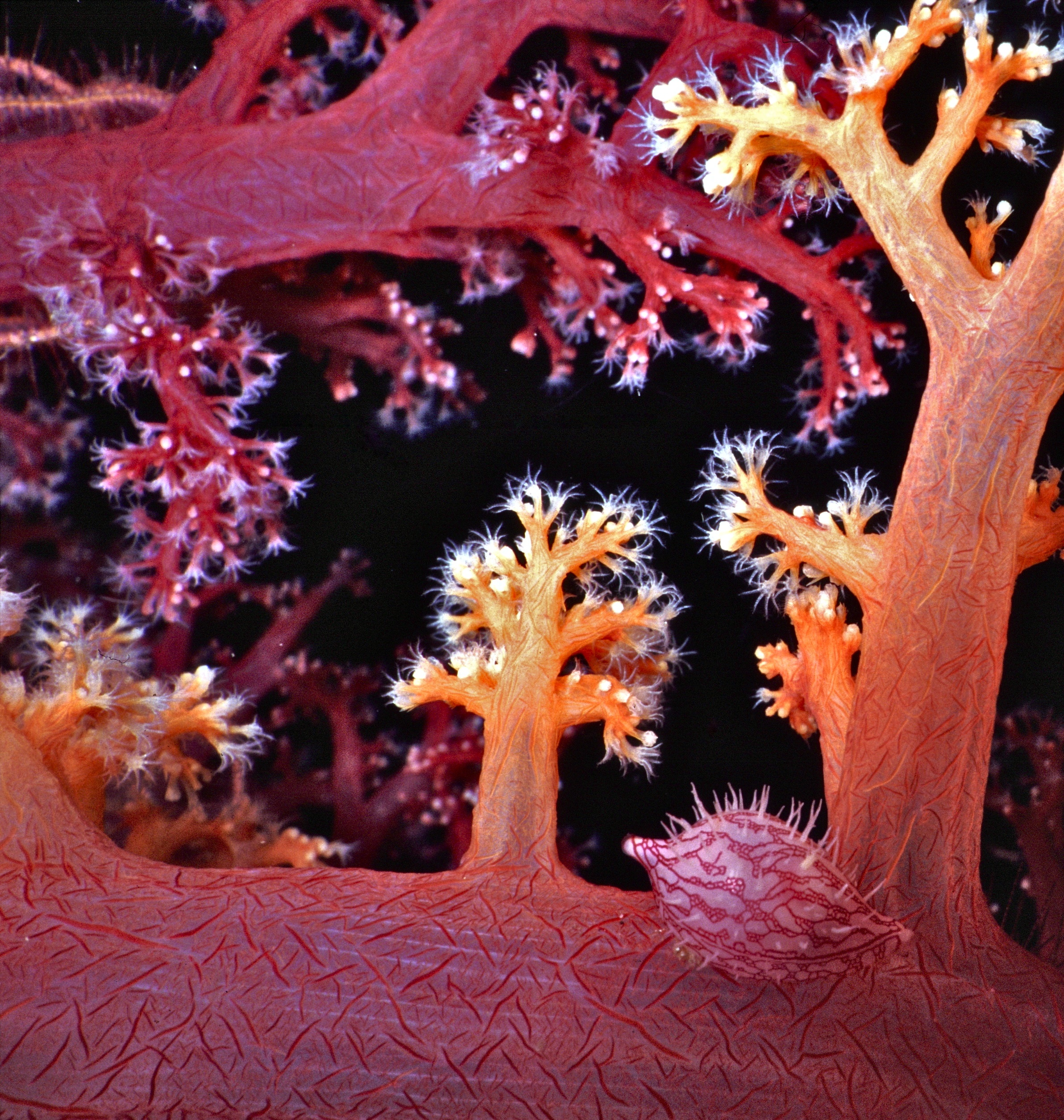 Bunaken, Sulawesi, INDONESIA